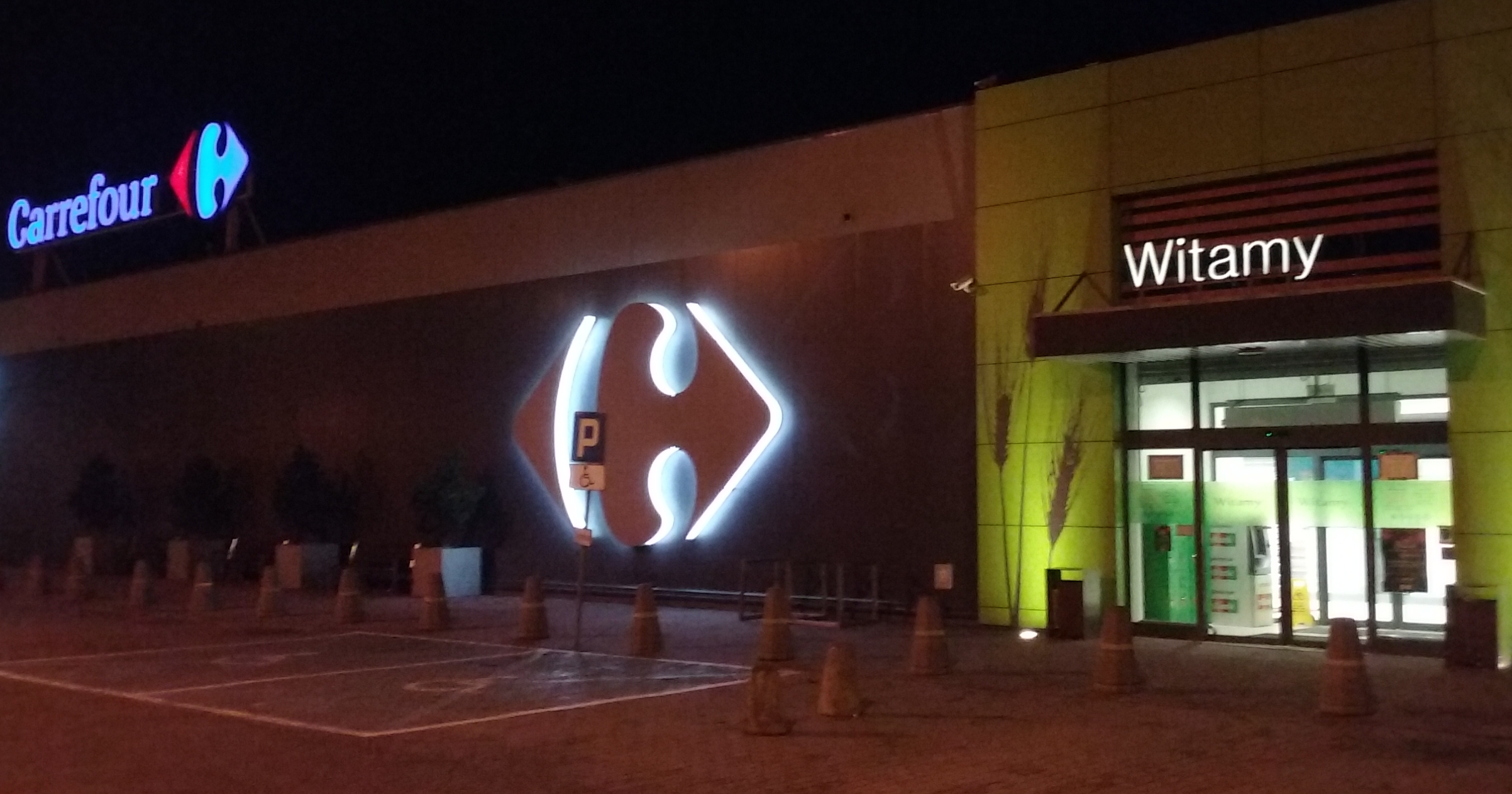 W 2015 Carrefour Polska zmodernizował swój obiekt handlowy w Tomaszowie Mazowieckim. Remont objął rozbudowę pasażu handlowego, zmianę formatu sklepu z supermarketu na hipermarket całodobowy oraz remodeling wnętrza oraz elewacji budynku. Tomaszów Mazowiecki, ul. Jana Pawła II 22, woj. łódzkie